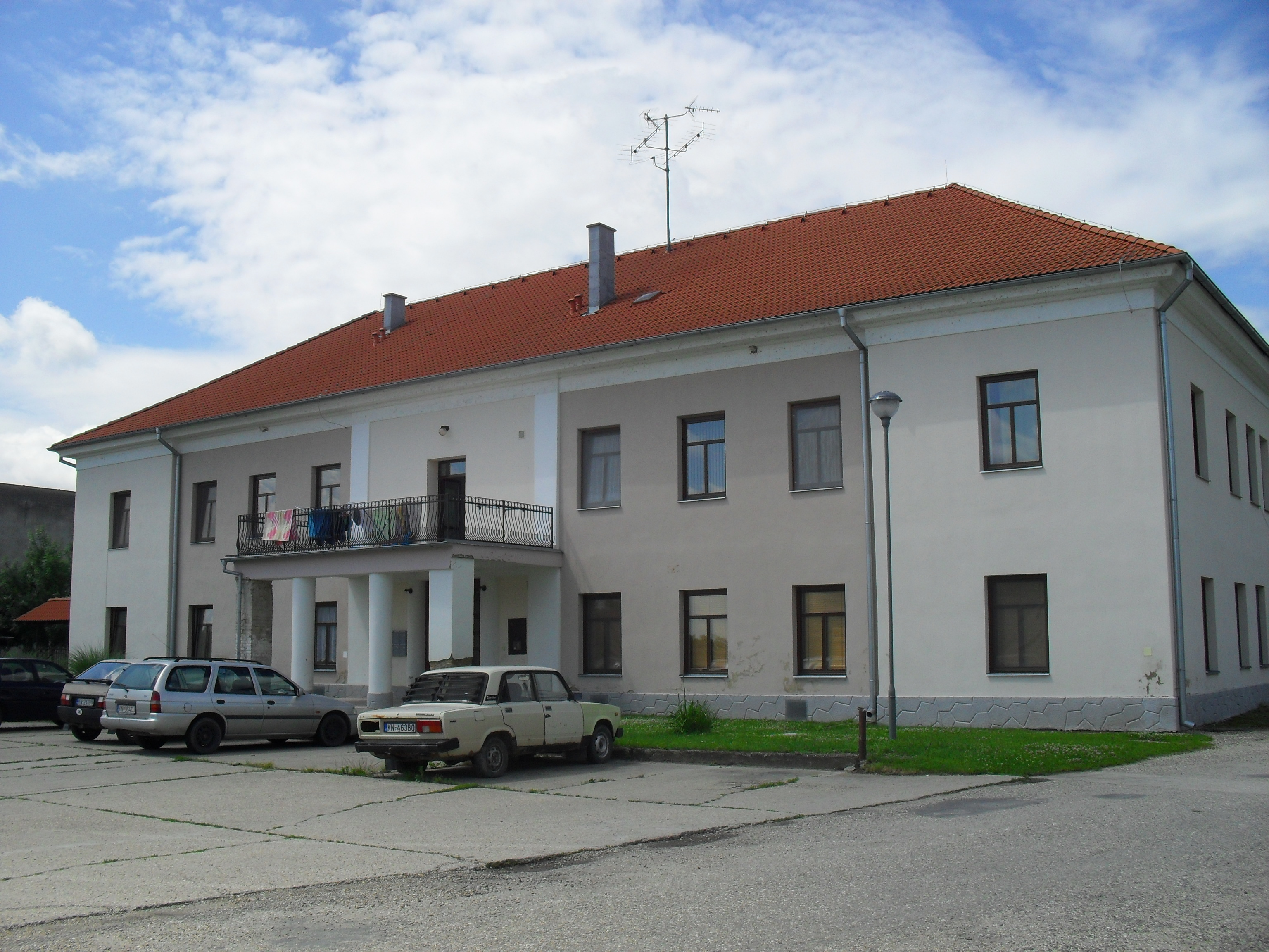 Nagykeszi